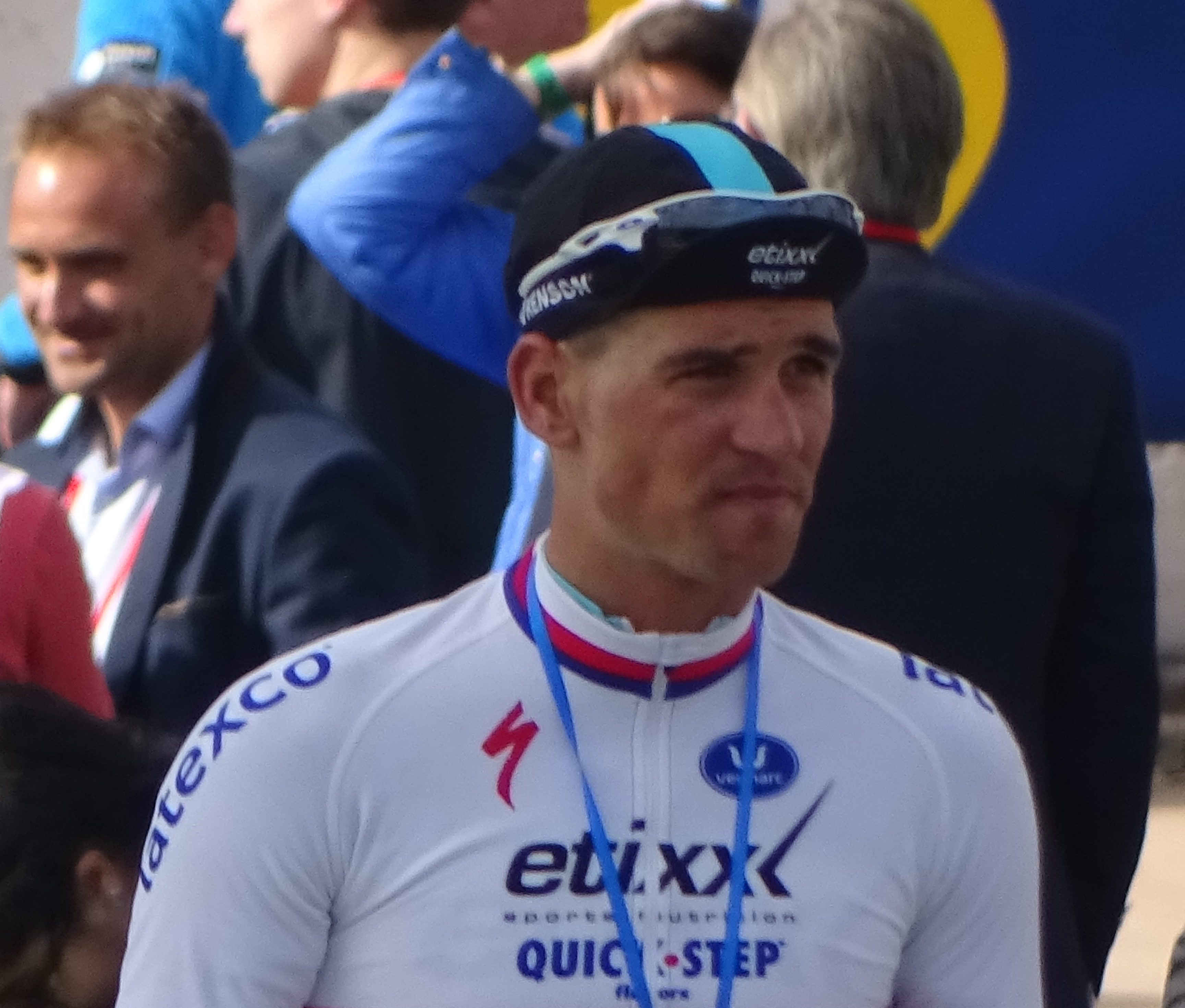 Reportage réalisé le dimanche 12 avril à l'occasion de l'arrivée du Paris-Roubaix 2015 à Roubaix, France.